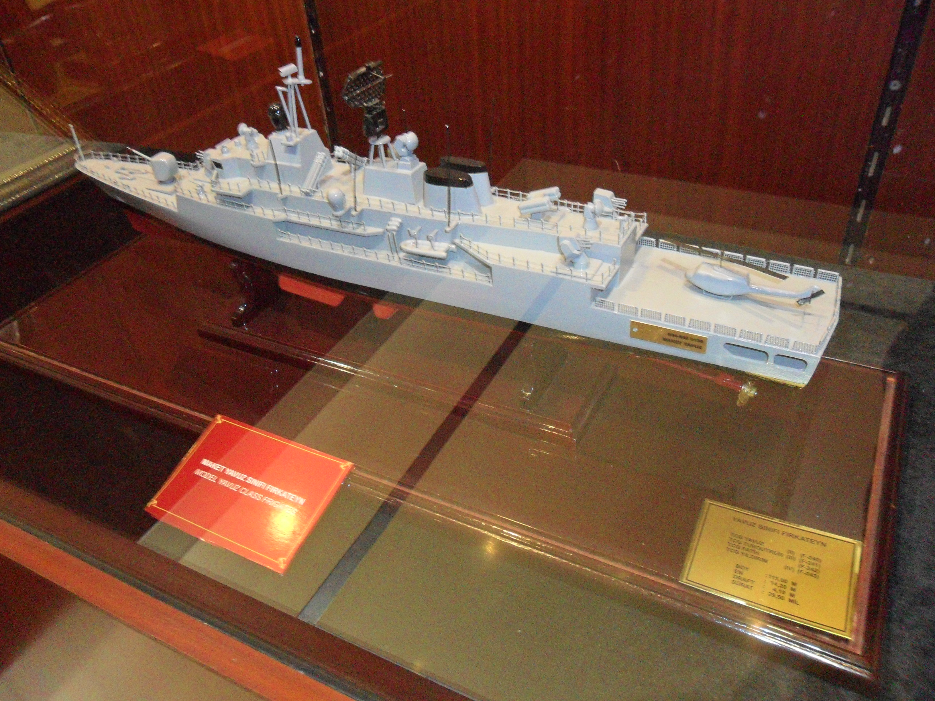 Mersin Deniz Müzesinde sergilenmekte olan Yavuz sınıfı fırkateyn maketi.